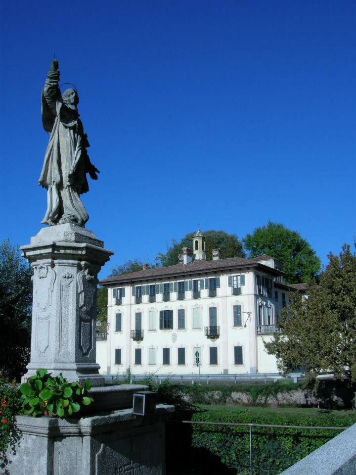 Statua di San Carlo Borromeo e Villa Visconti Maineri a Cassinetta di Lugagnano (MI) - Italia